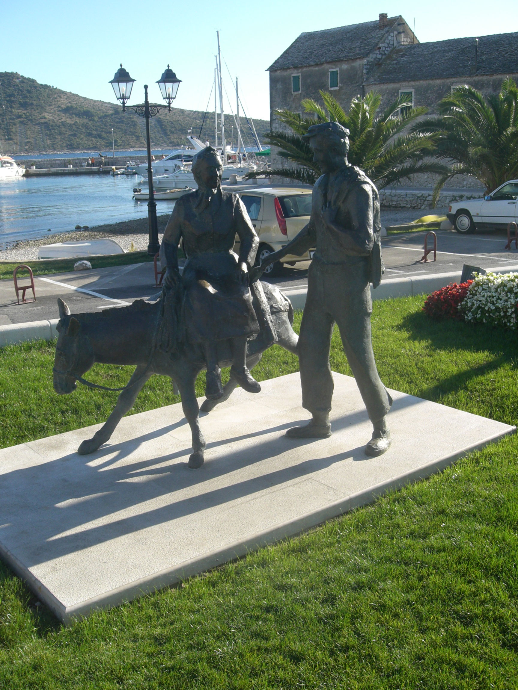 Primošten, Hrvatska